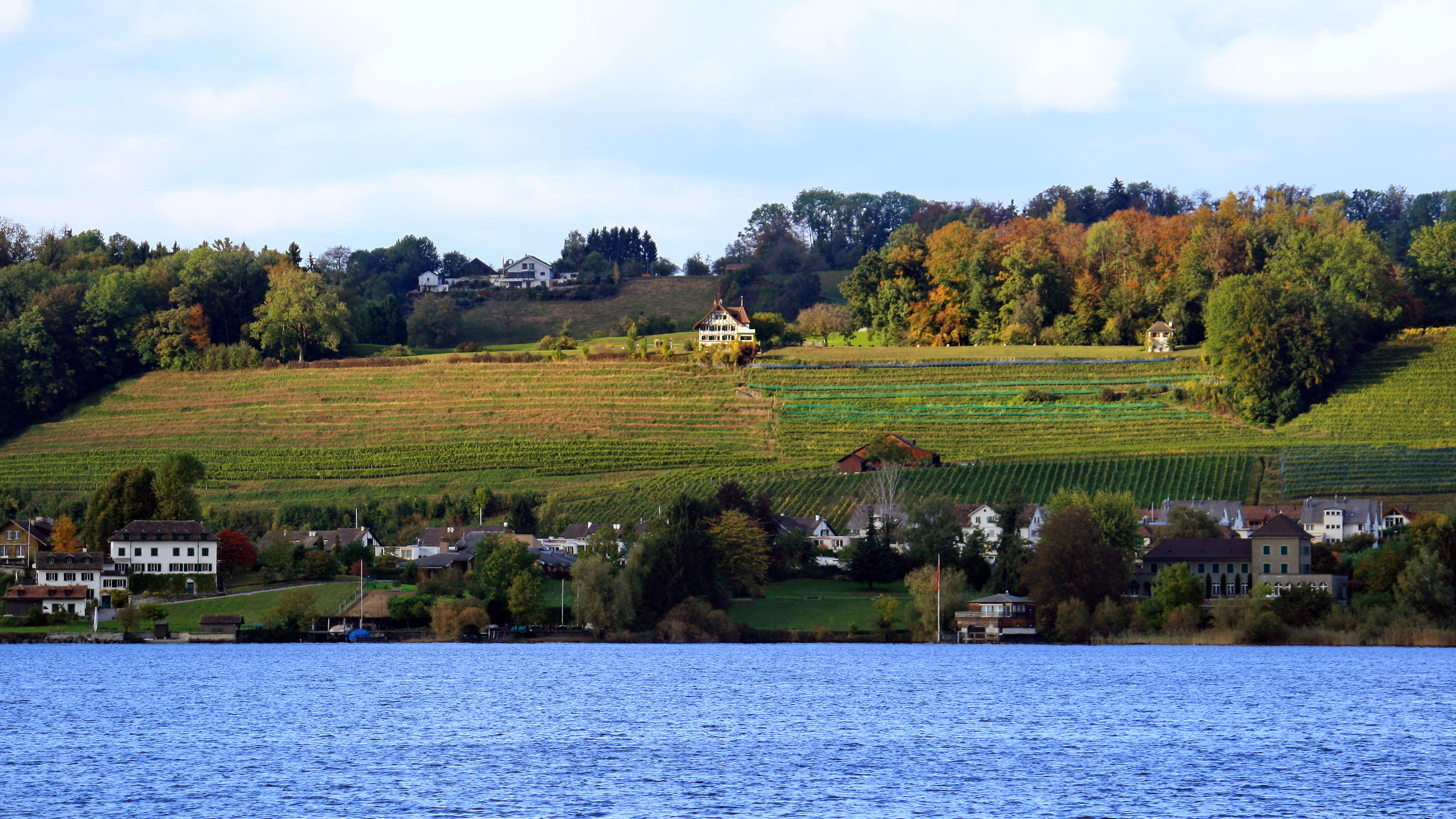 Feldbach (Switzerland) as seen from Lindenhof in Rapperswil (Switzerland)